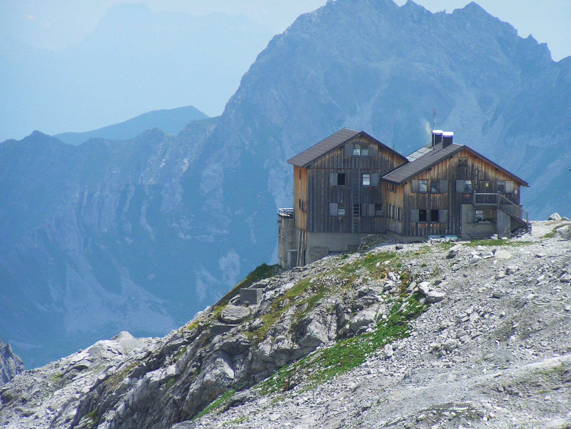 " Totalphütte " near Lünersee in Vorarlberg / Austria. Backside